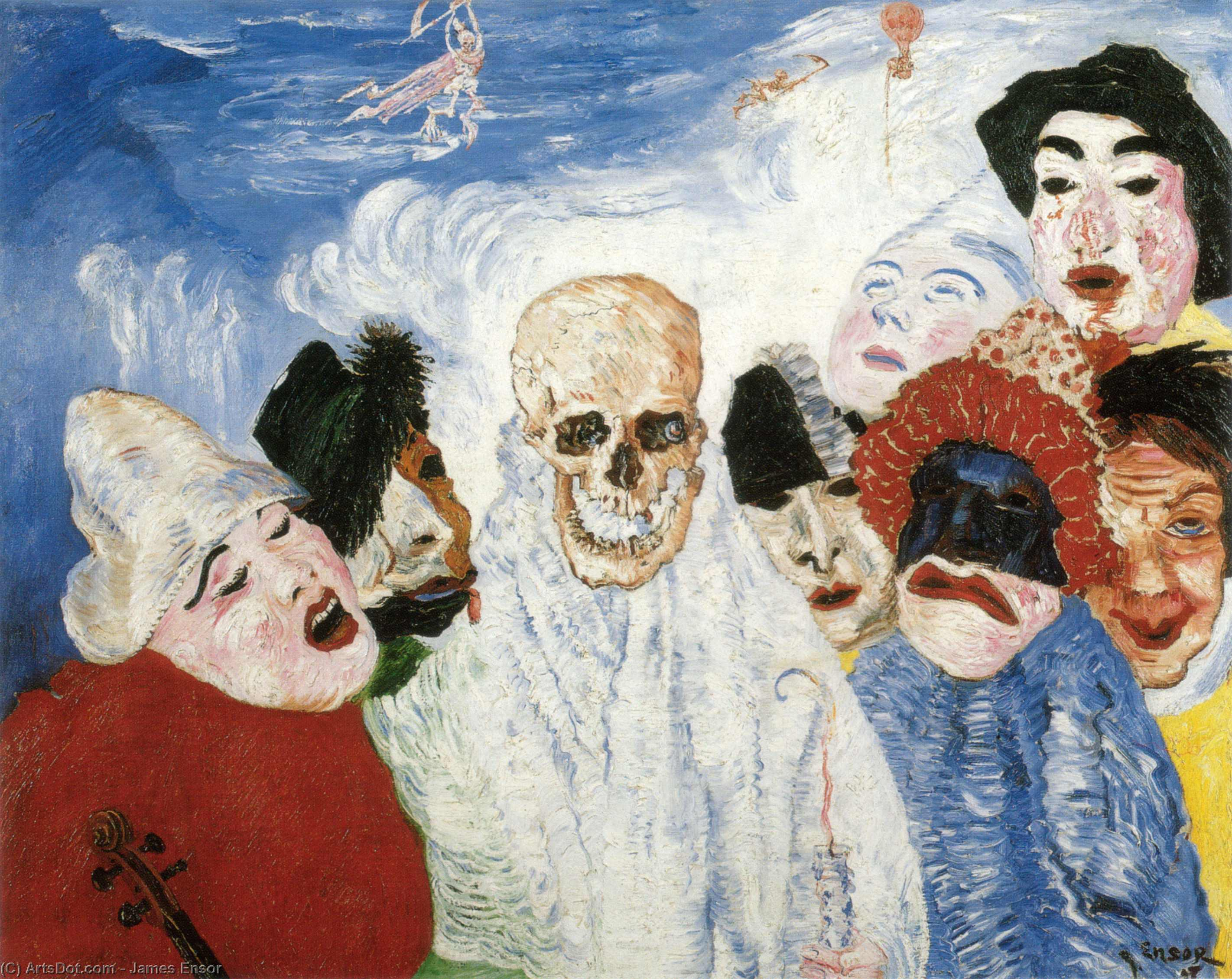 "La muerte y las mascaras", pintura de James Ensor de 1897.